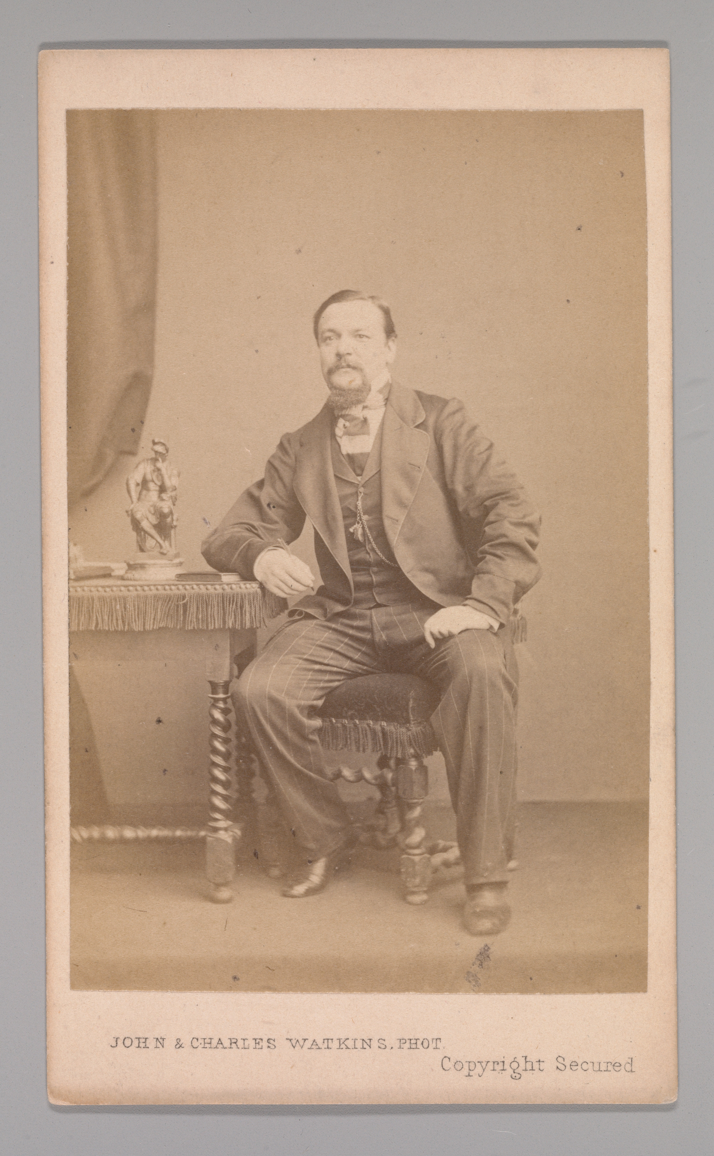 Carte-de-visite; Photographs